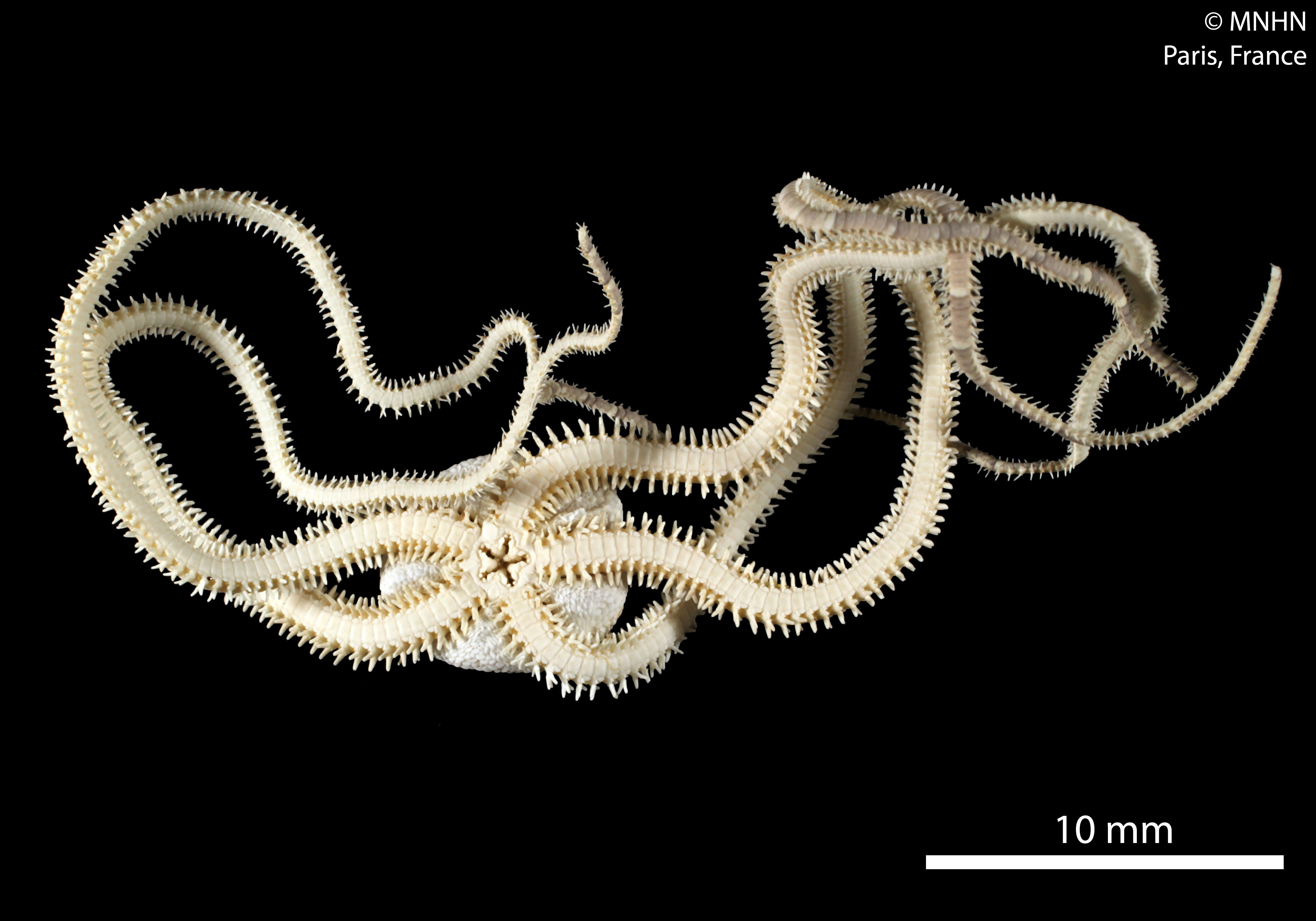 Amphioplus (Amphioplus) titubantiusLot de 6 spécimens MNHN-IE-2013-10155Collection : Échinodermes (IE)Muséum National d'Histoire Naturelle (Paris, France). Origine : Libellé du pays : MADAGASCAR Localité/Lieu-dit : Nosy Bé Nom du collecteur : Thomassin & Pichon Océan : Indien Île : Madagascar Numéro de station : E.9